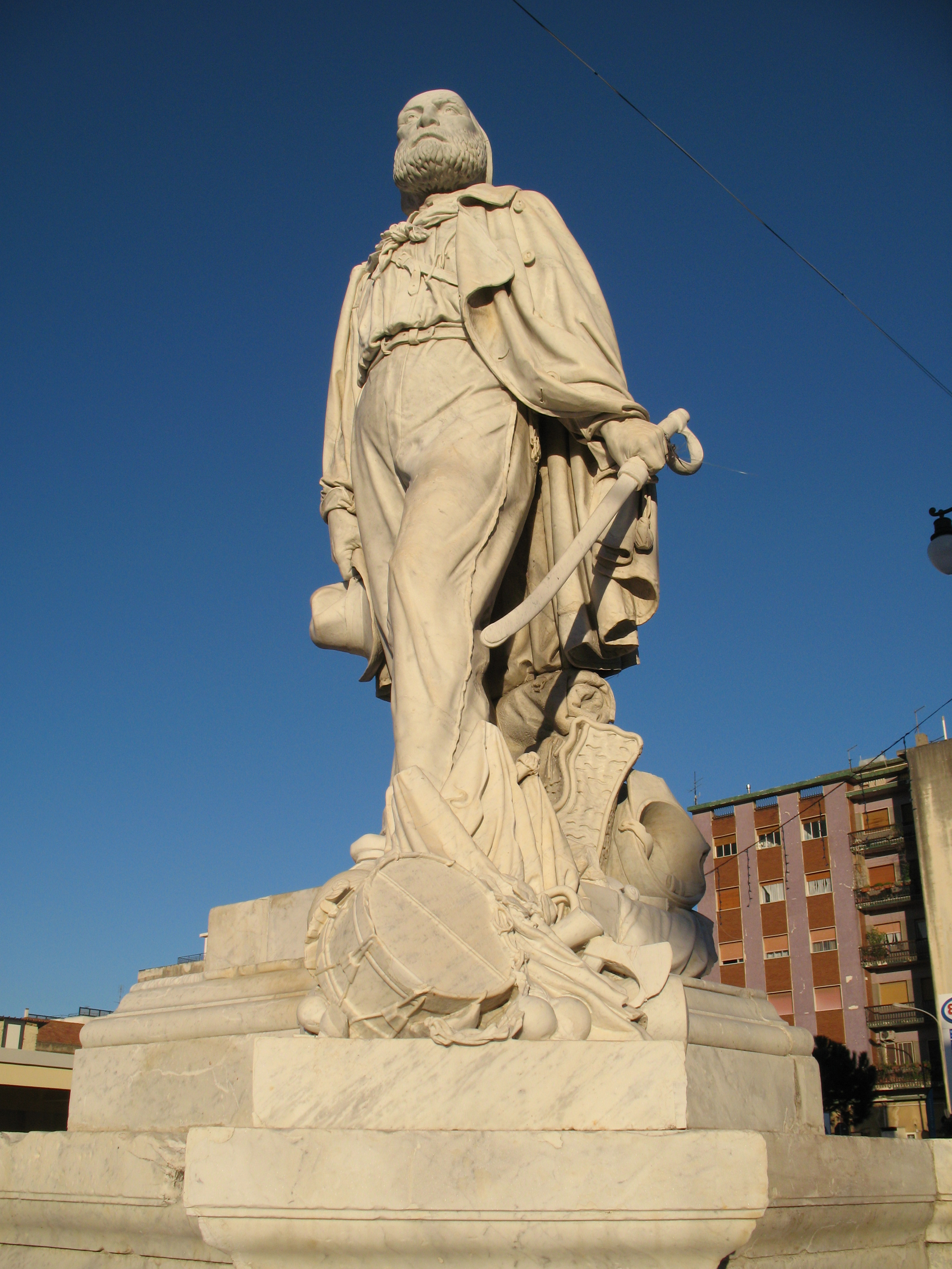 Monumento a Giuseppe Garibaldi (lato destro), Villa San Giovanni, Italia